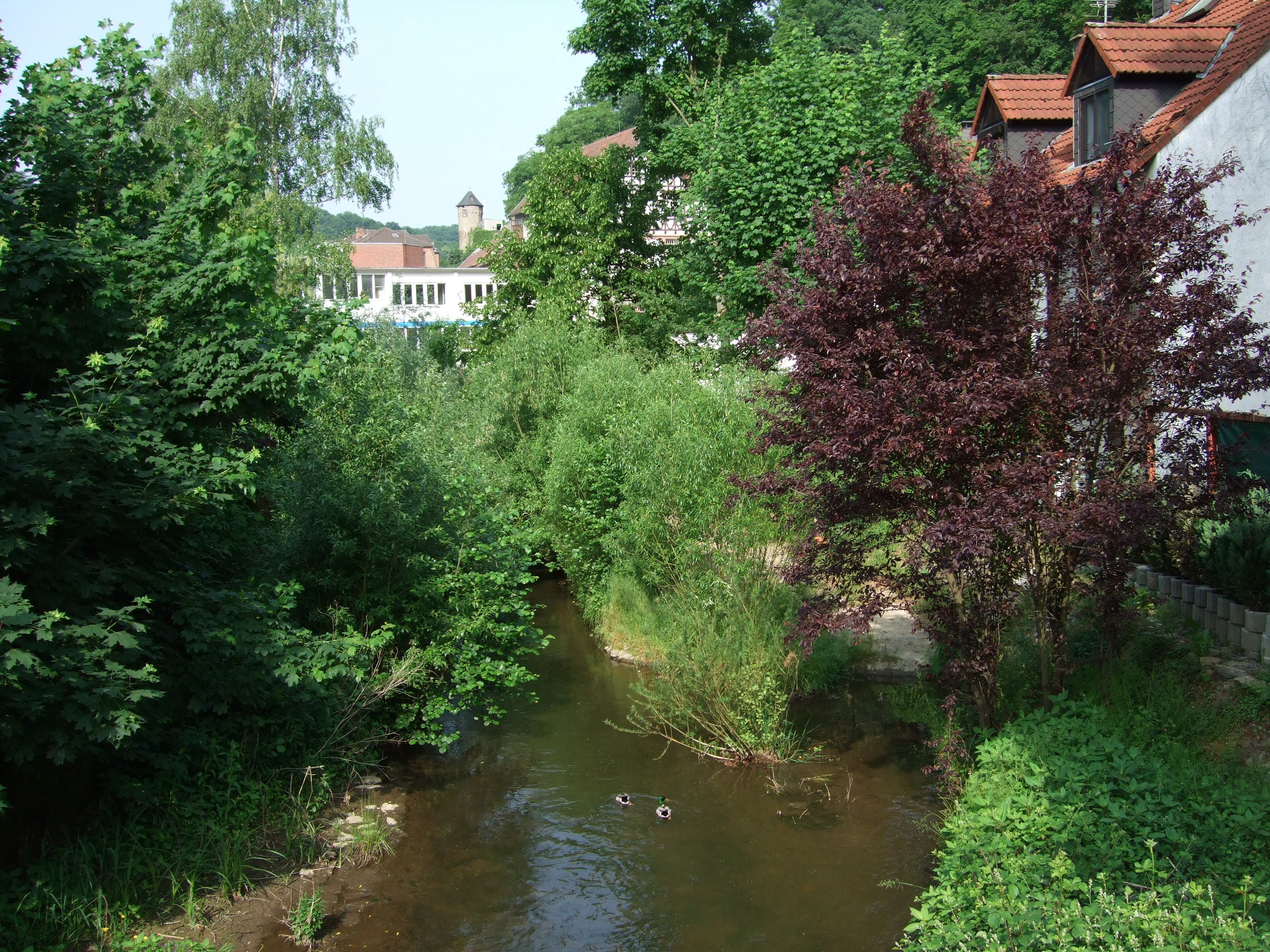 Schwarzbach in Eppstein